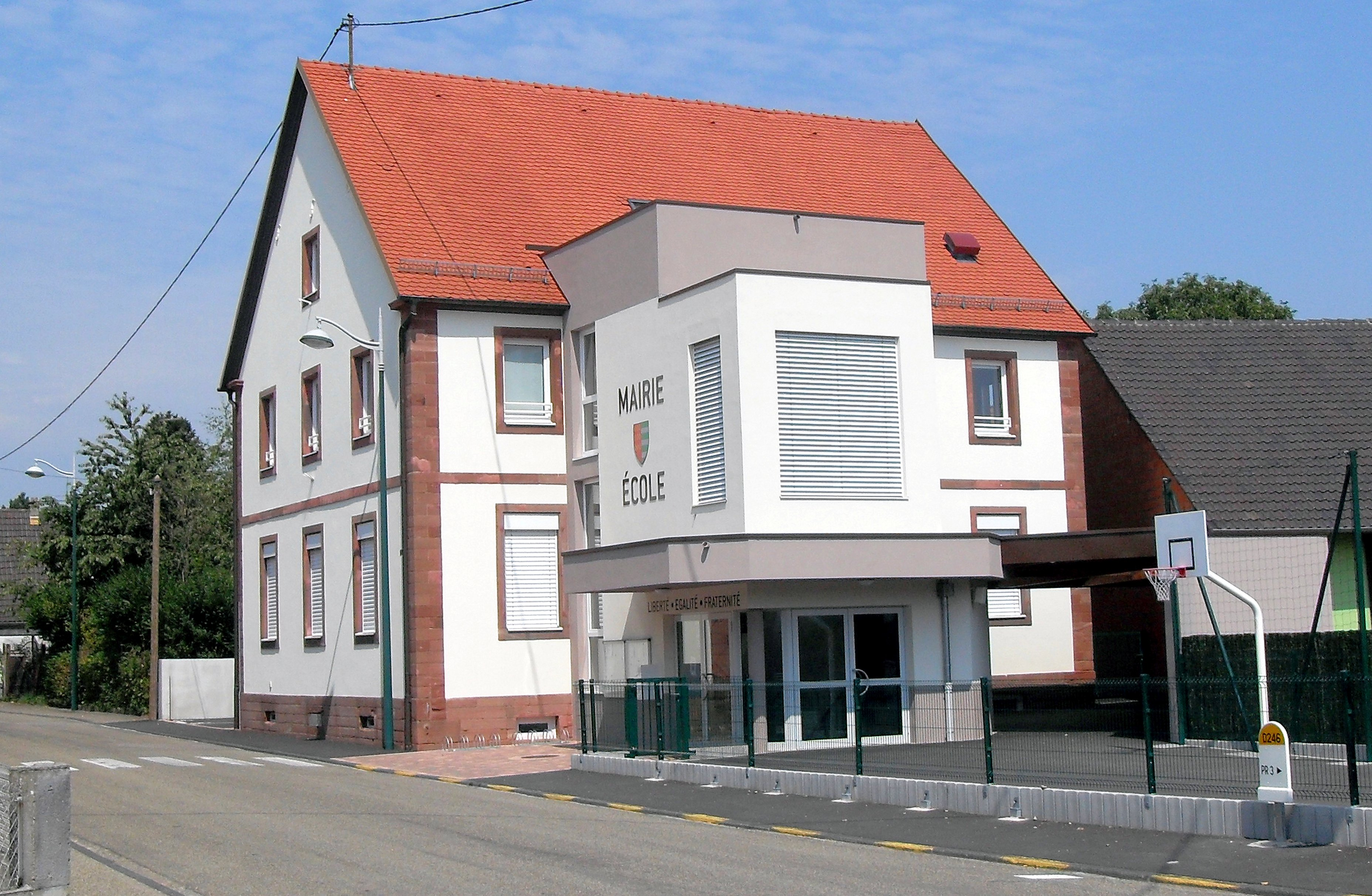 La mairie-école d'Oberlauterbach